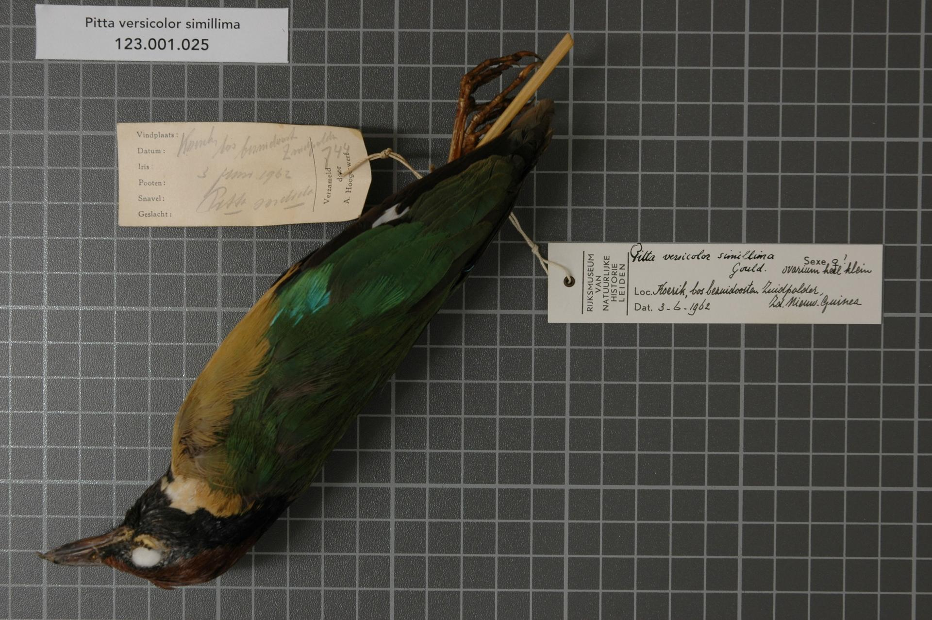 Pitta versicolor simillima Gould, 1868